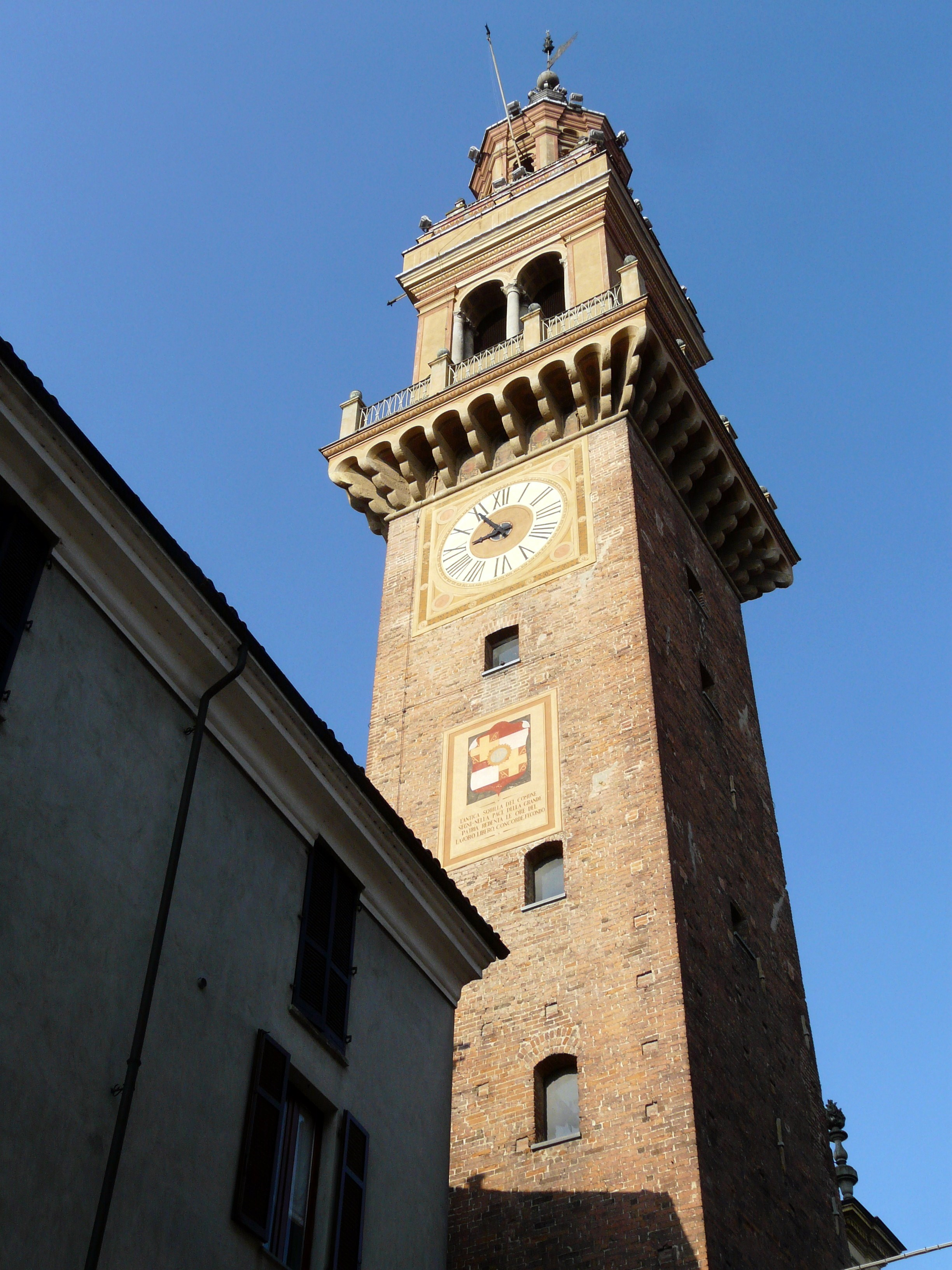 Torre Civica, Casale Monferrato, Piemonte, Italia